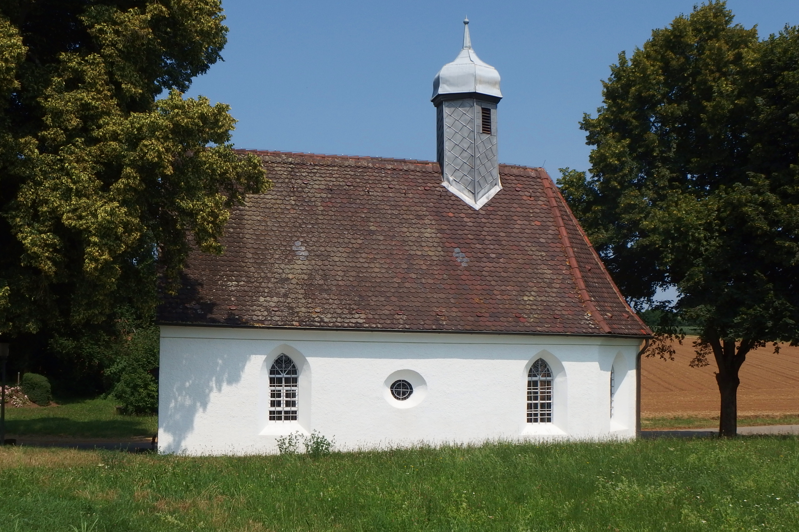 Beiswanger Kapelle, Böbingen an der Rems